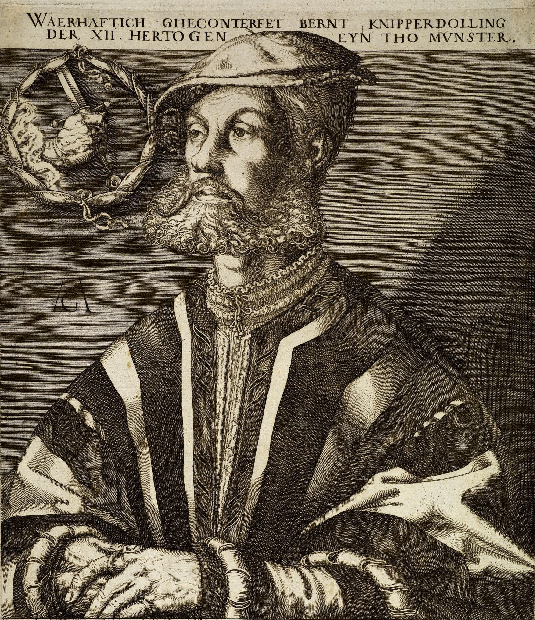 Porträt von Bernd Knipperdolling, spiegelverkehrte Kopie eines Kupferstichs von Heinrich Aldegrever